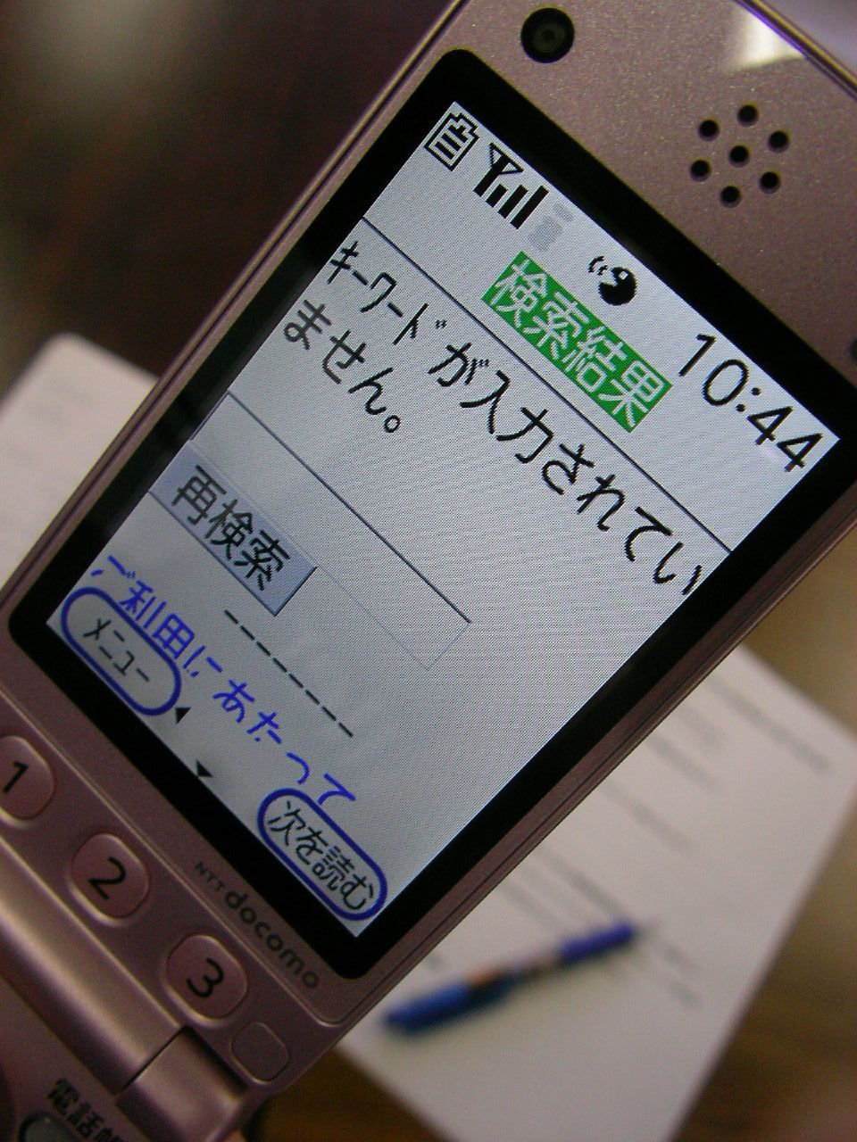 ハーモニー・アイ「ユーザーと共に行動し携帯の使い勝手を体験・検証する交流会」